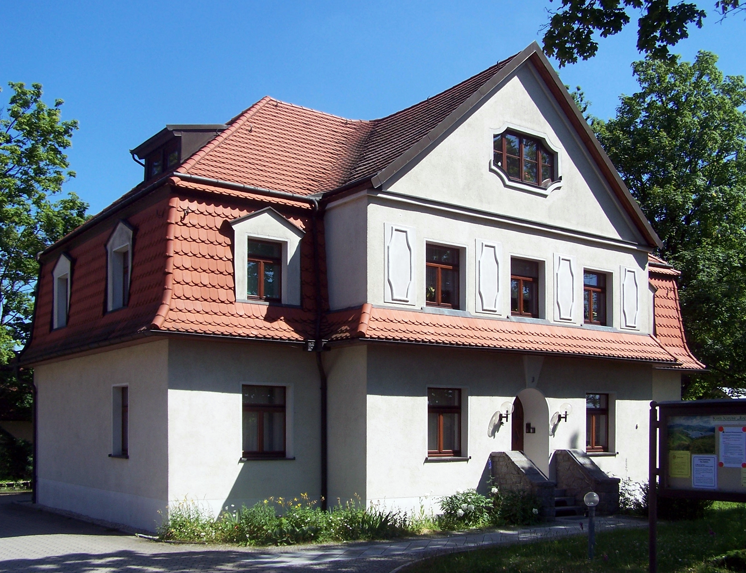 Katholisches Pfarramt in Königsbrück